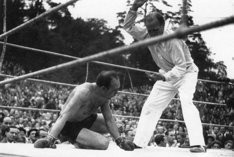 Boxkampf Hucks gegen Gahrmeister ADN-ZB/Archiv Westdeutschland 1947: Die große Sensation im Berufsboxsport bildet die Niederlage des deutschen Mittelgewichtsmeisters Dietrich Hucks, der seinen Titel durch technischen k.o. an Fritz Gahrmeister verlor. - Hucks nach einem Niederschlag am Boden. 24. Juni 47 [Herausgabedatum] 631-47 Abgebildete Personen: Hucks, Dietrich: Boxer, Deutschland